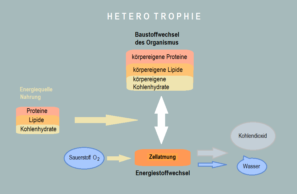 Heterotrophie